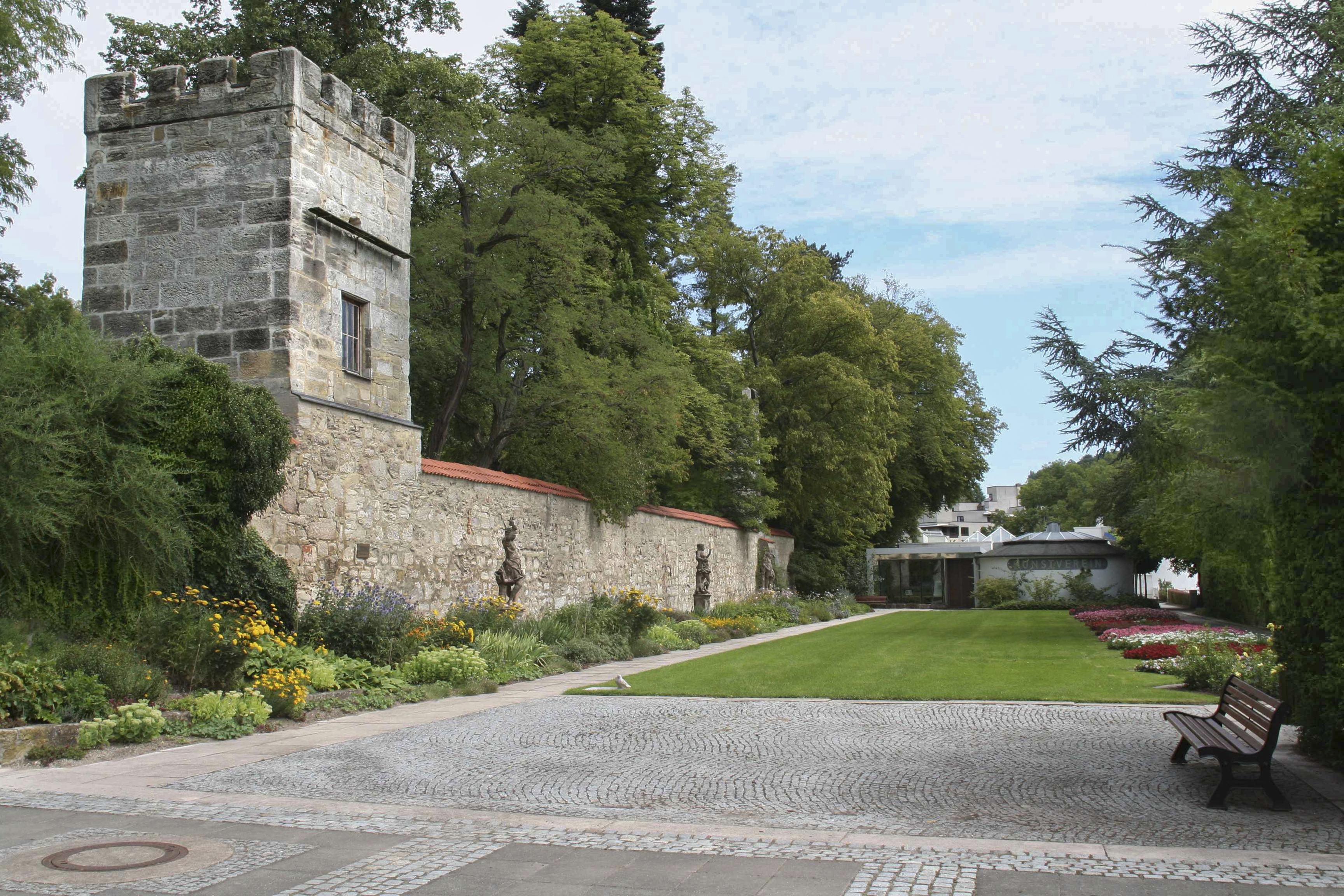 Kleiner Rosengarten im Coburger Hofgarten